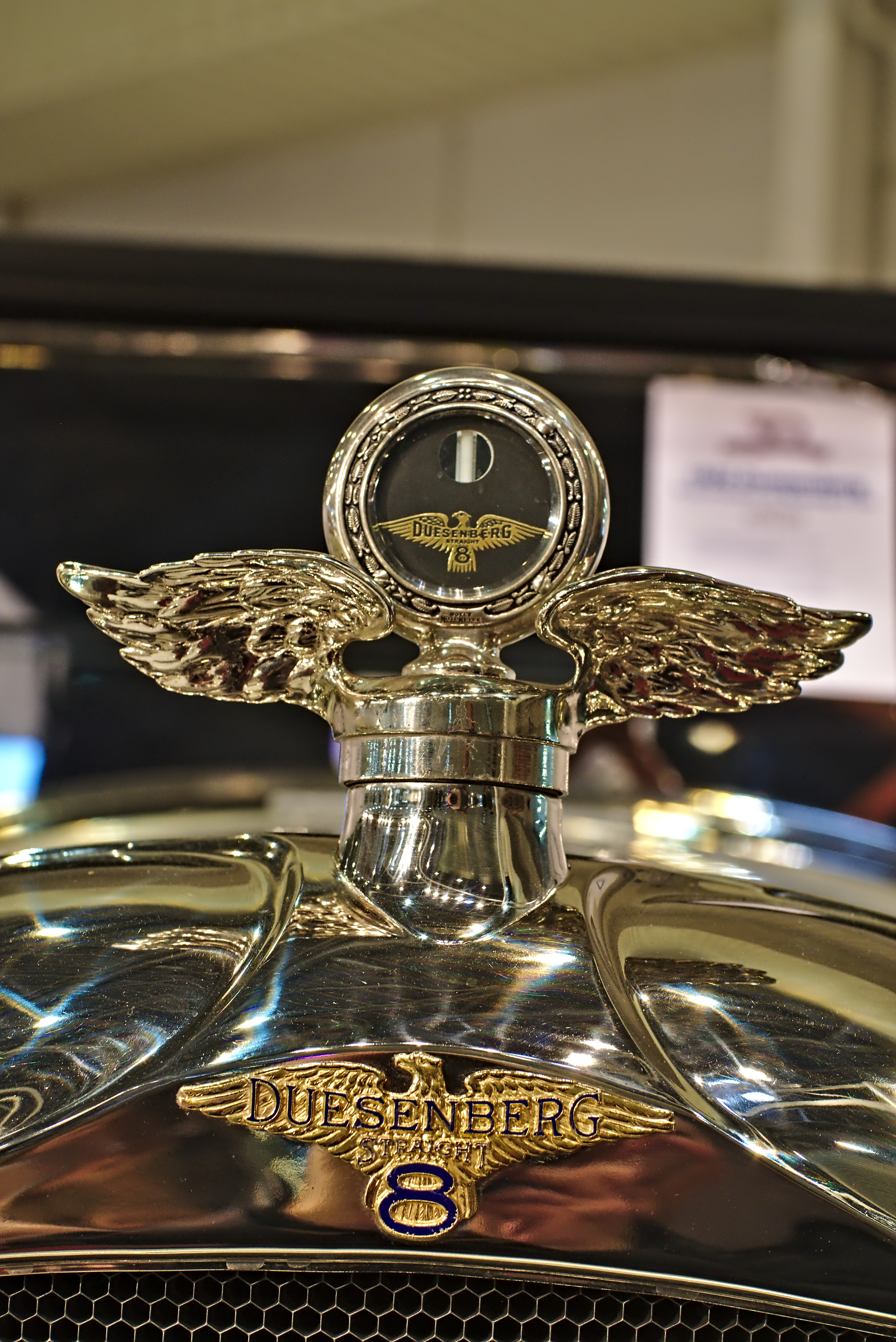 Techno Classica 2019